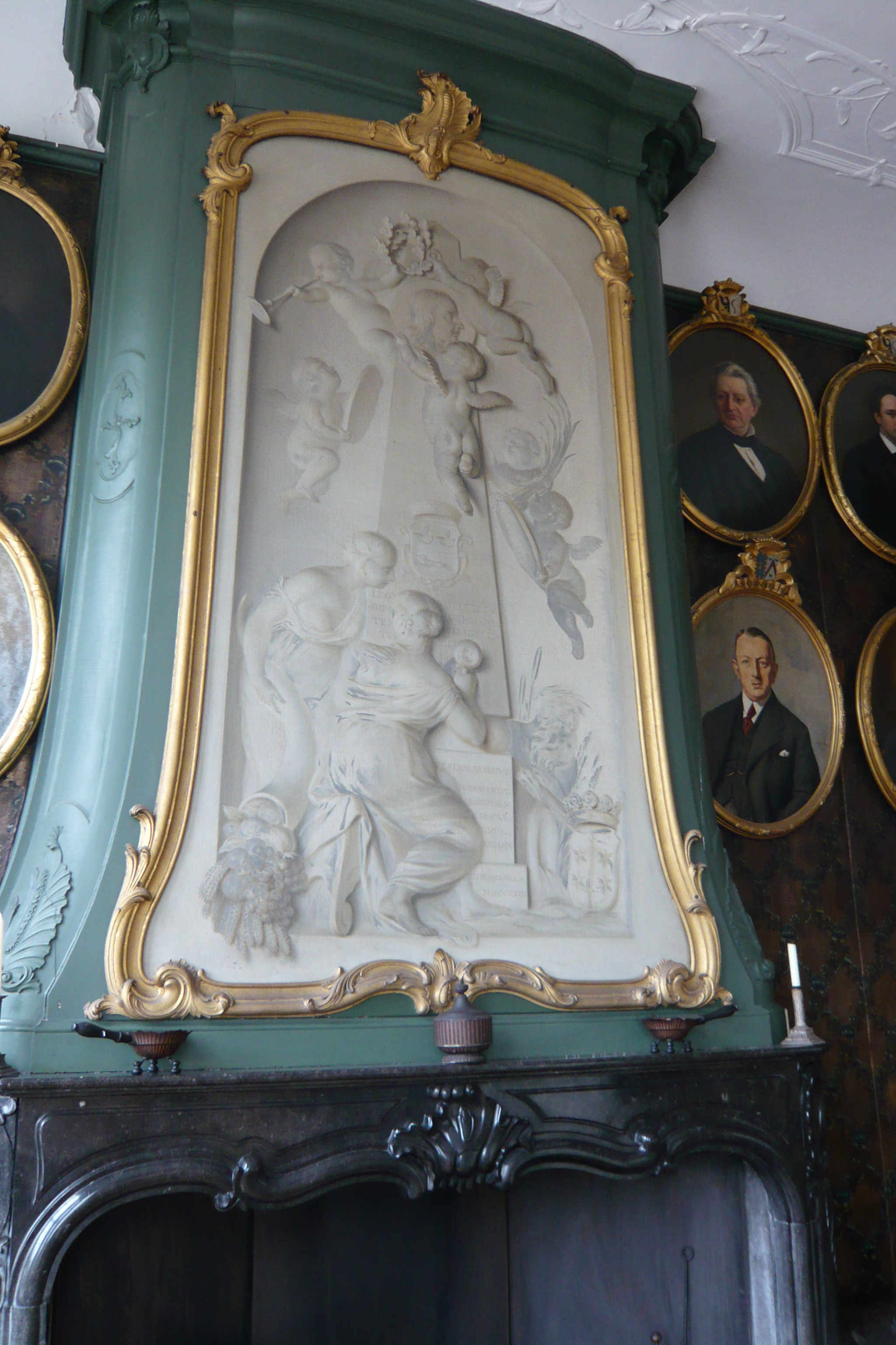 Haarlem, Hofje van Noblet, Schoorsteen regentenkamer, Hooimarkt, Haarlem. Grisaille schilderij Verheerlijking van Leonard Noblet, 1763, door Tako Hajo Jelgersma (1792-1795).